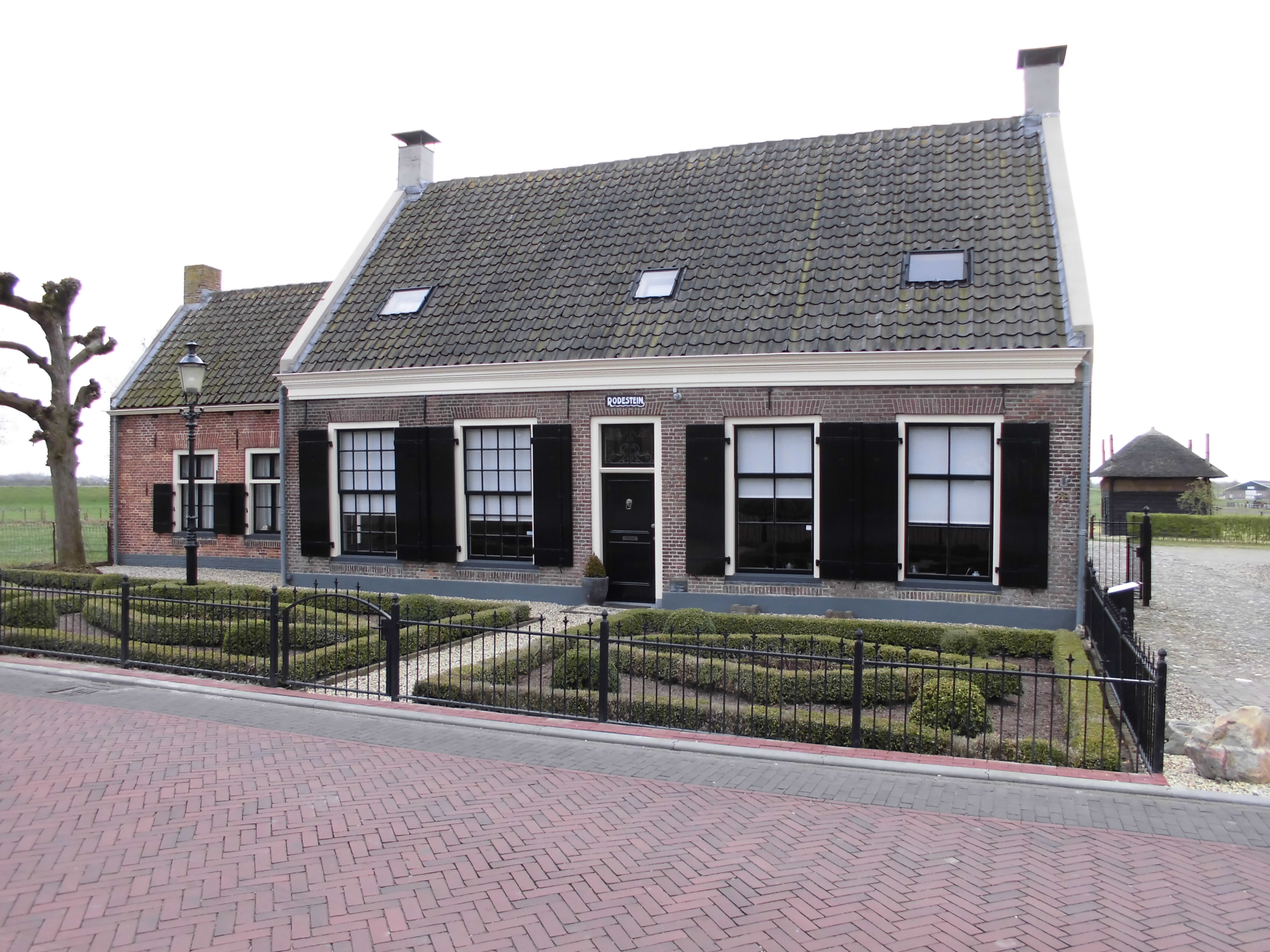 Rodestein, Kersweg 28 Amerongen